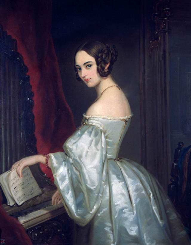 Портрет княгини Марии Ивановны Кочубей(1818-1843)